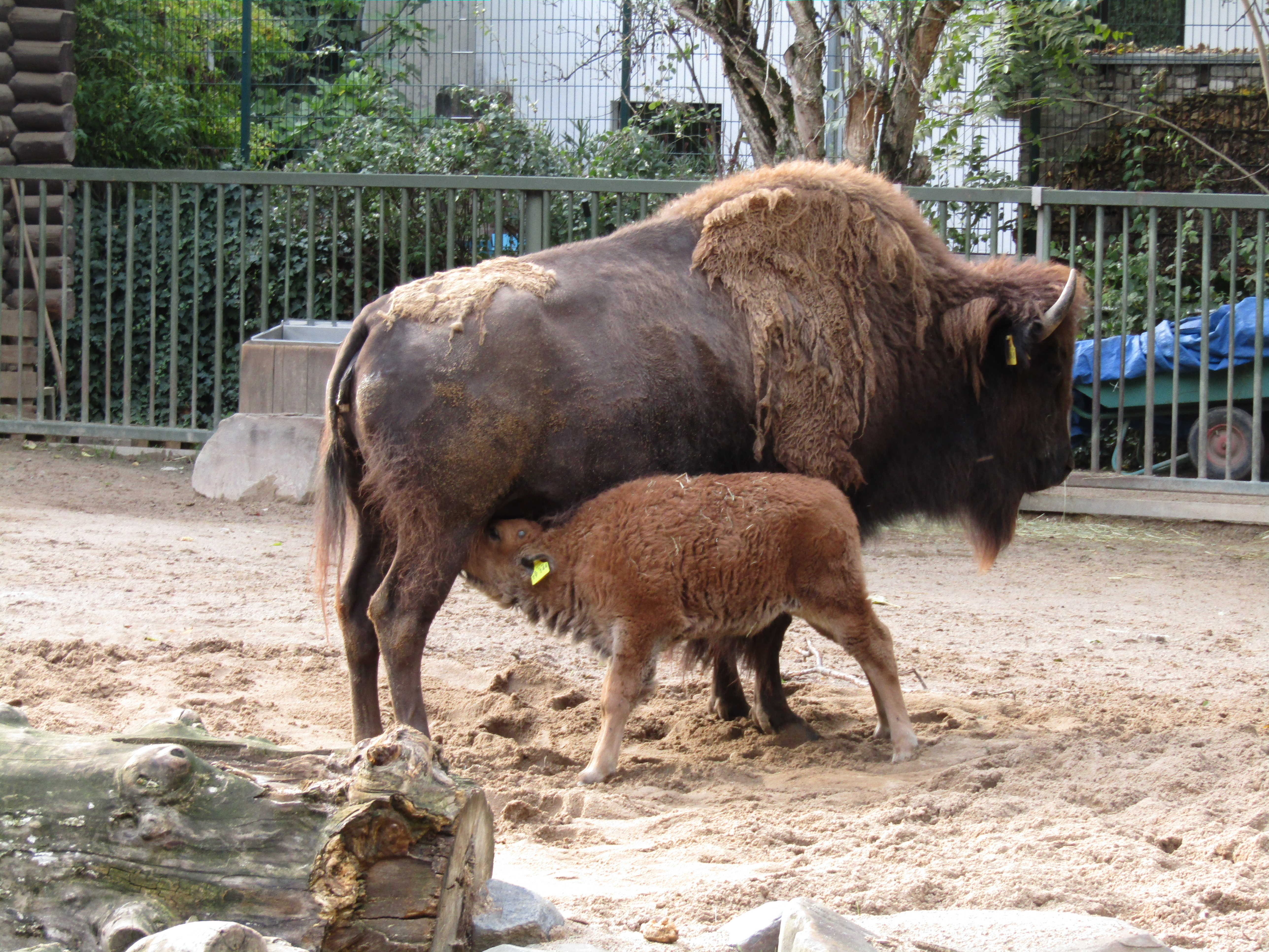 Junger Präriebison (Bison bison bisoni) beim Säugen im Kölner Zoo